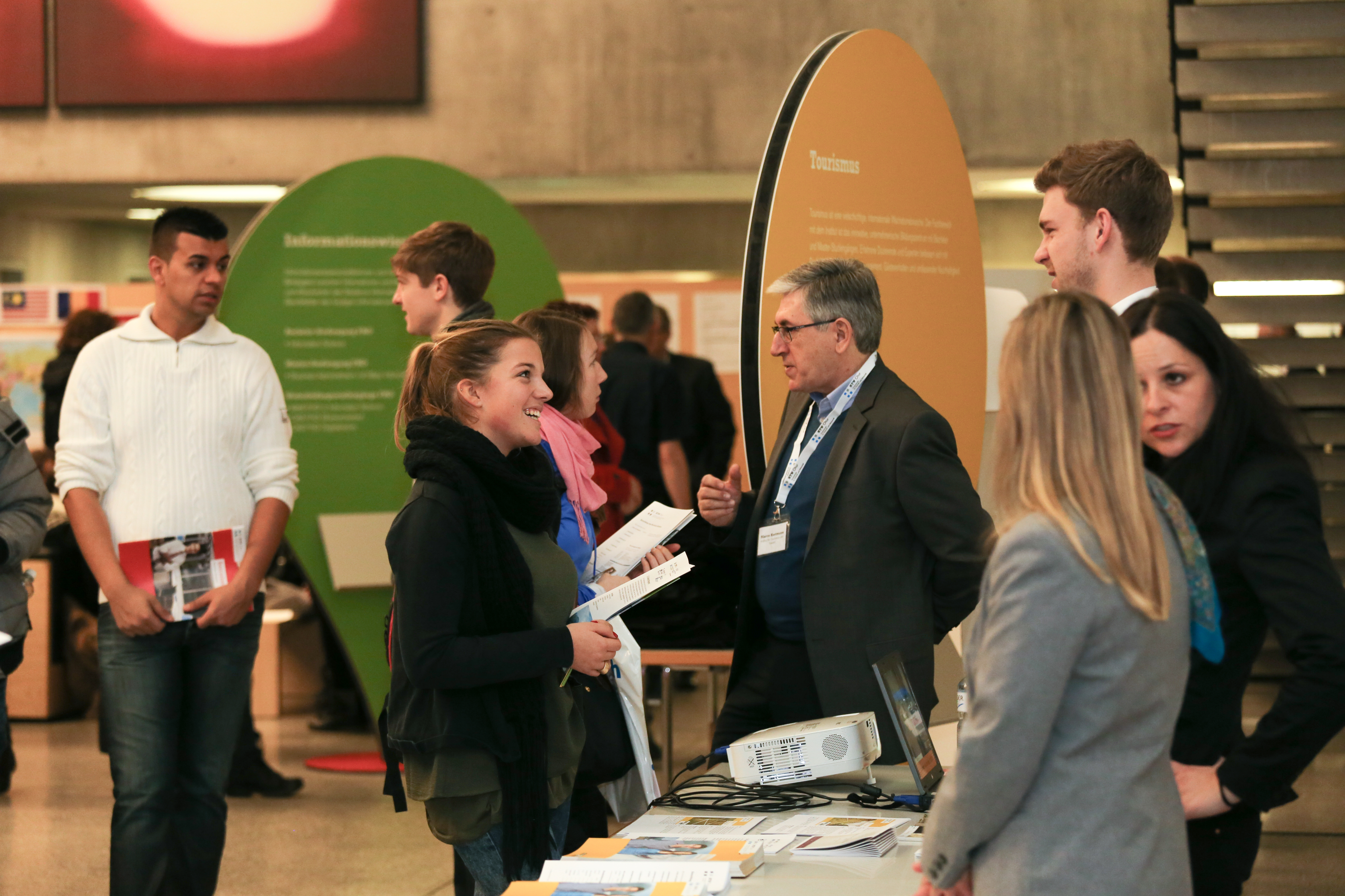 Infotag 2014 (persönliche Beratung)